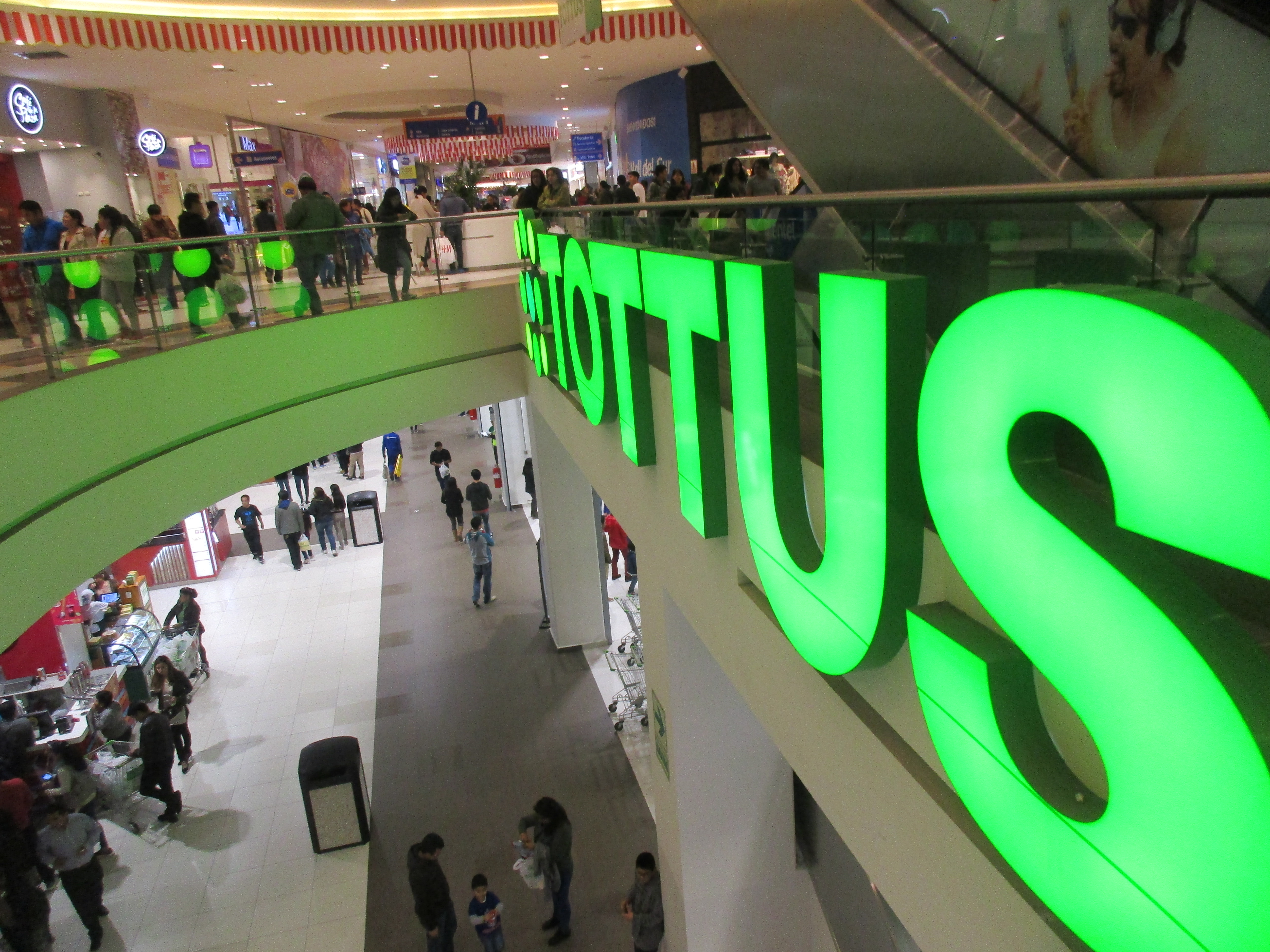 Local de Tottus en Mall del Sur en Lima, Perú.